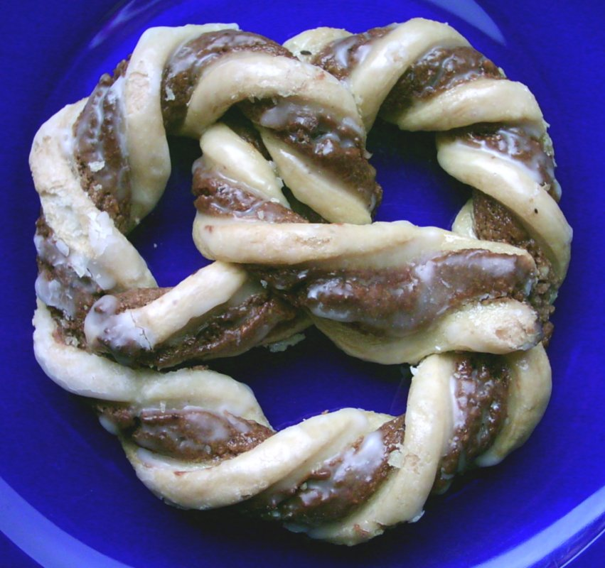 Nussbrezel